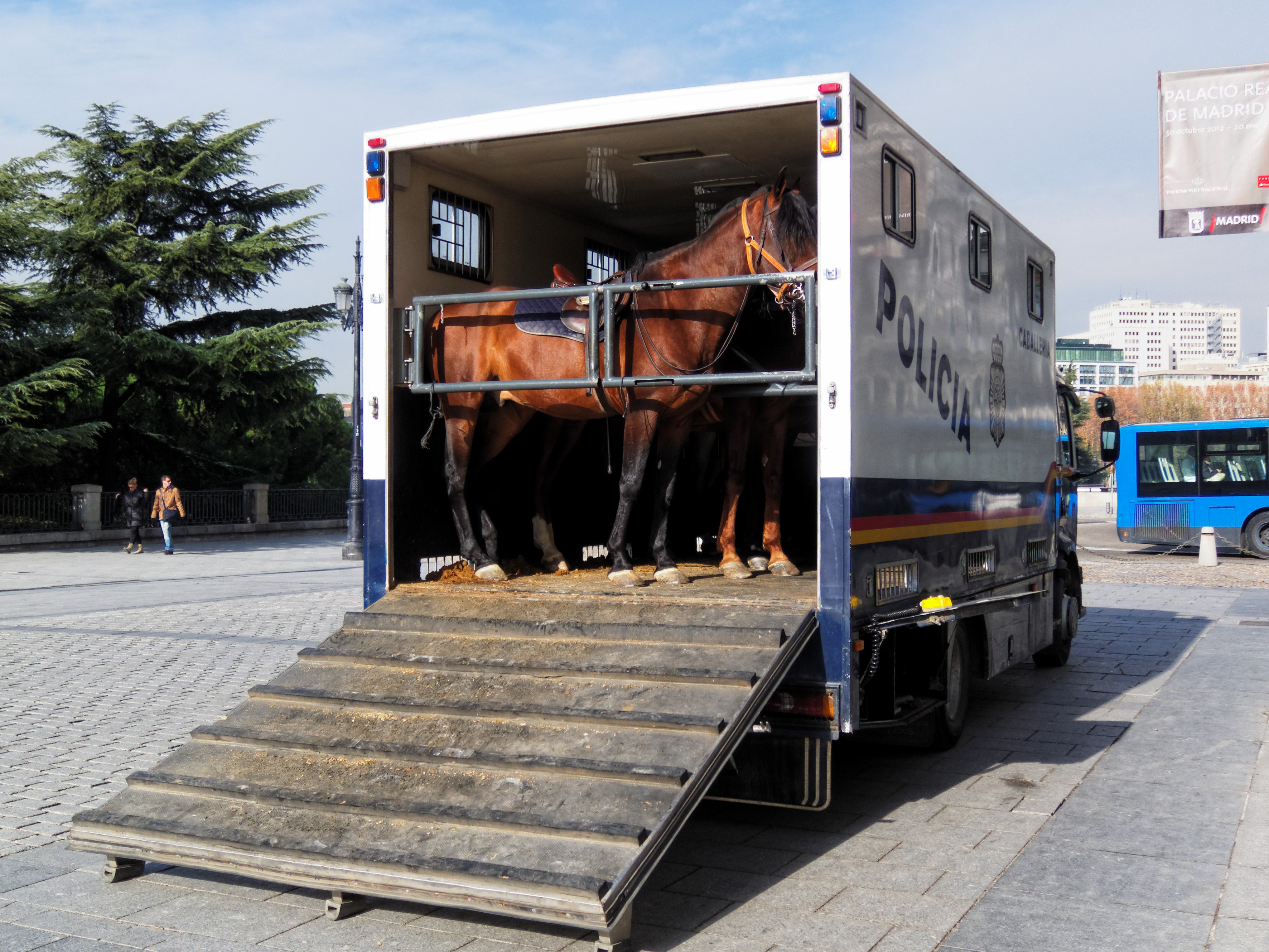 Camión de transporte de equinos de la caballería de la Policía Nacional española en Plaza de Oriente, Madrid.